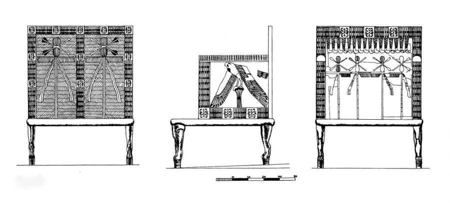 Rekonstruktion eines Armsessels (Temp. Reg. 22.2.60) aus dem Grab der Hetepheres (G 7000x) nach George Andrew Reisner. Giza, 4. Dynastie, ca. 2600 v. Chr.